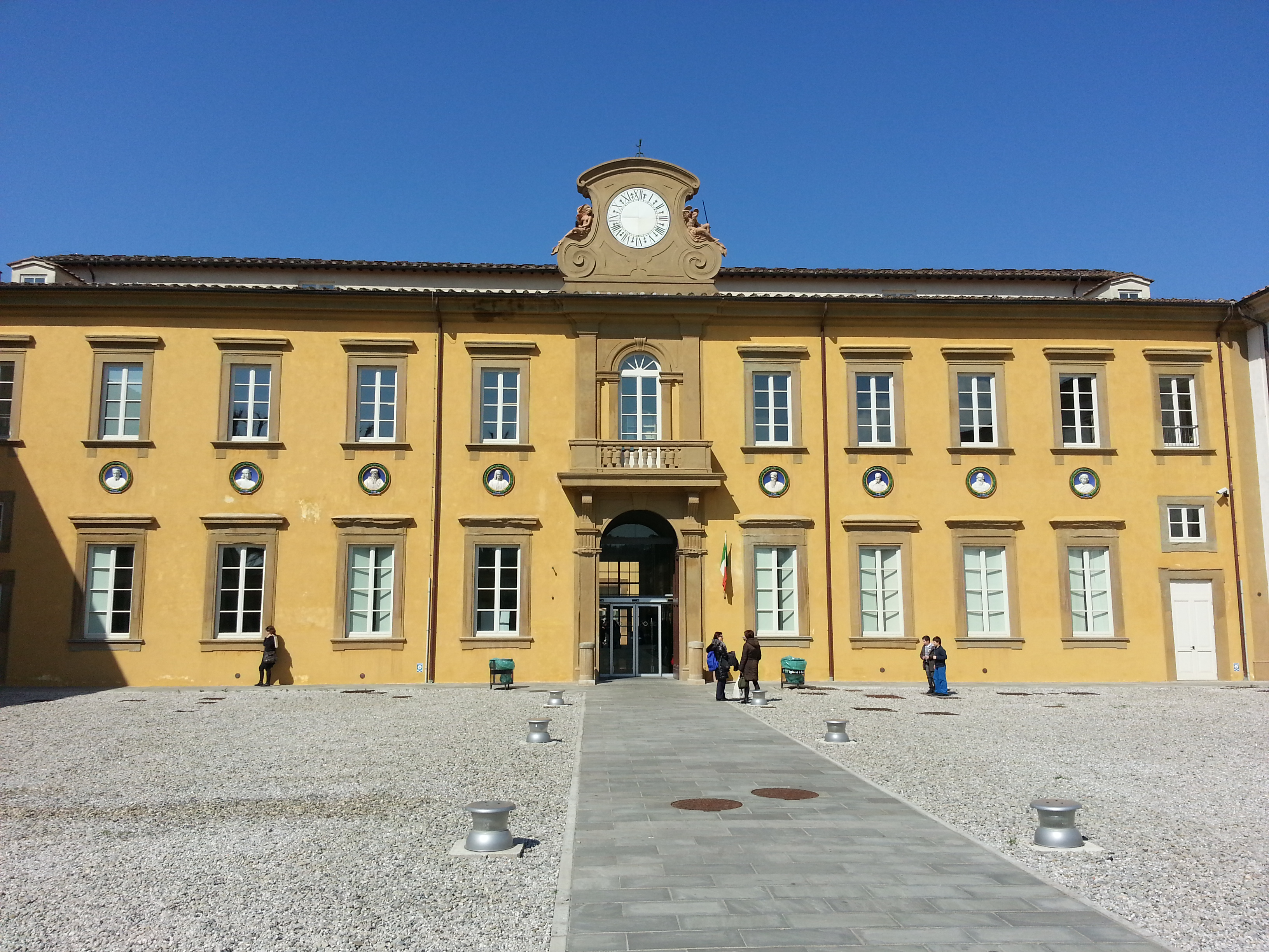 Facciata della biblioteca Ragionieri Sesto Fiorentino